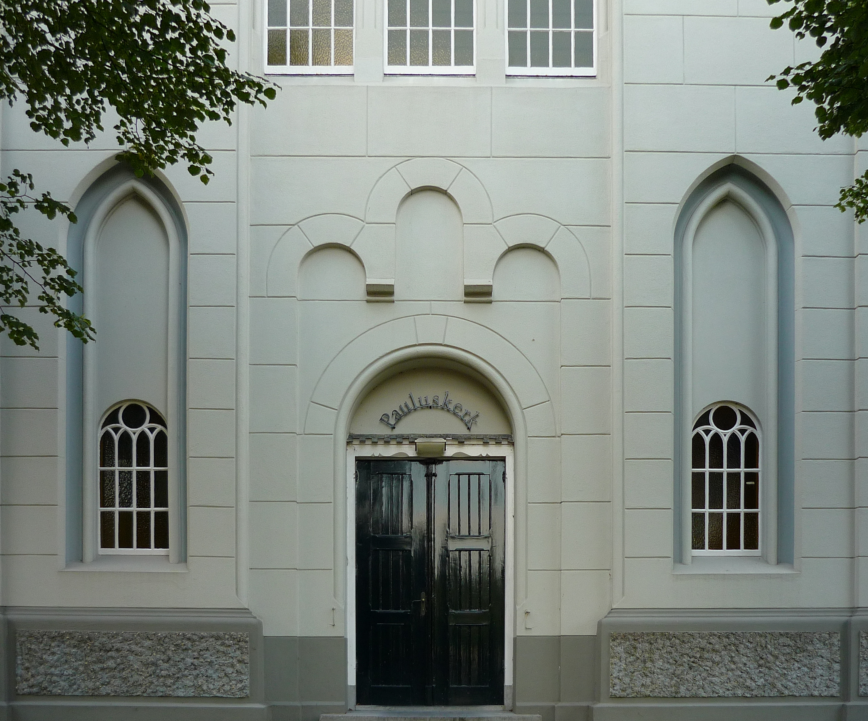 Deur aan de voorkant van de Pauluskerk te Baarn.